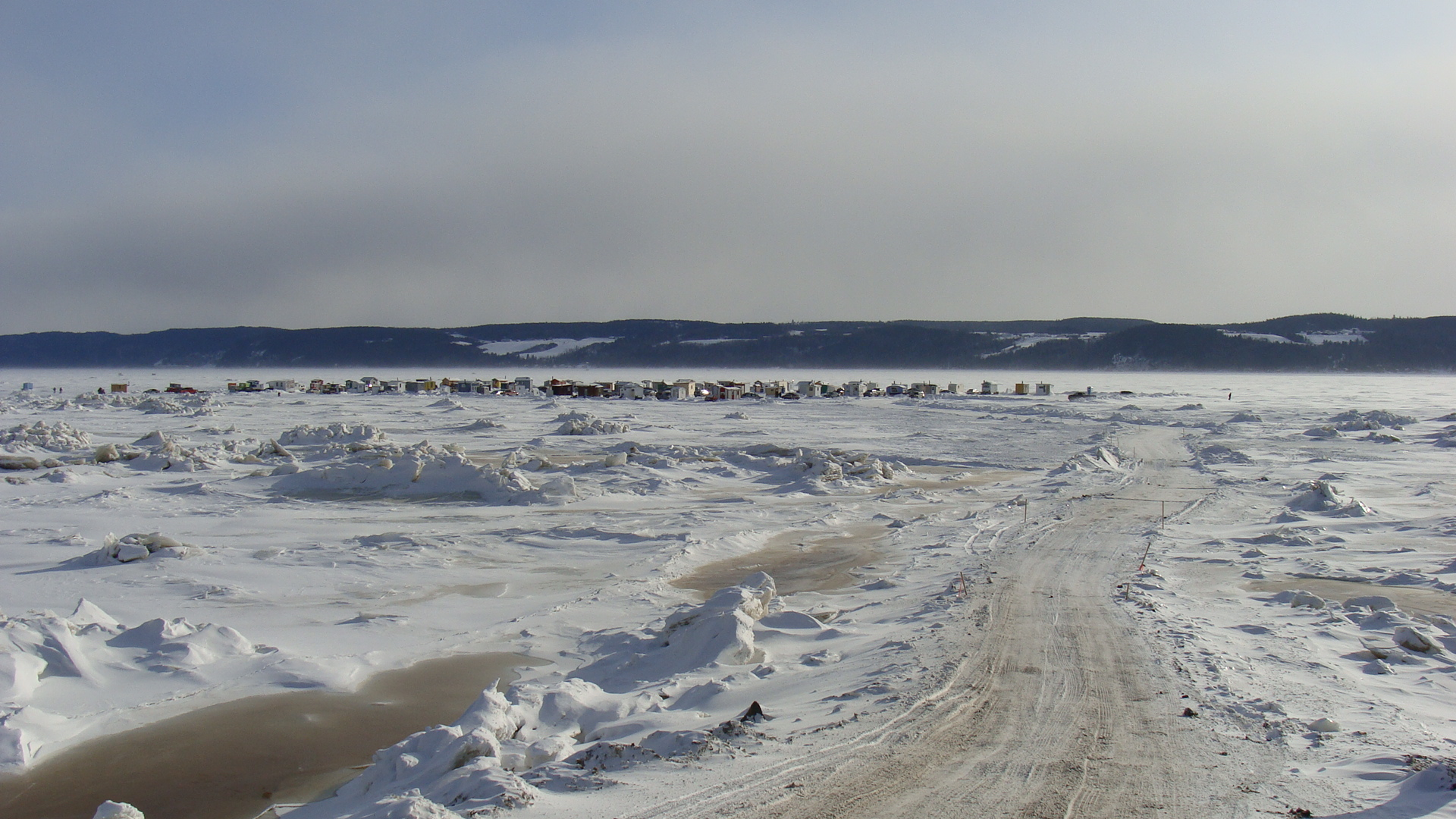 Village de cabanes à pêches à Saint-Fulgence, au Saguenay (Québec, Canada).